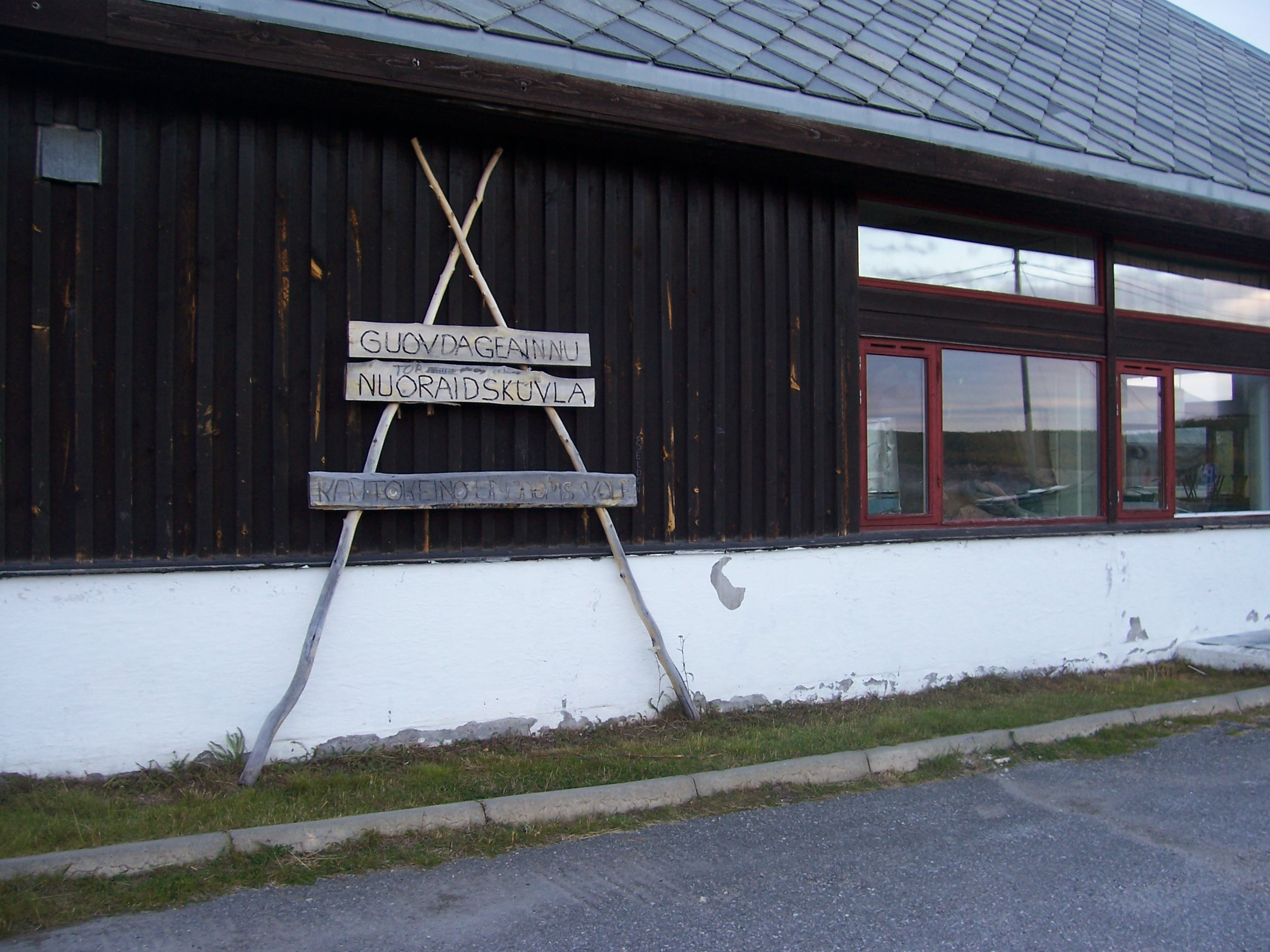 Skiltet til Kautokeino ungdomsskoleDavvisámegiella: Guovdageainnu nuoraidskuvlla šilta